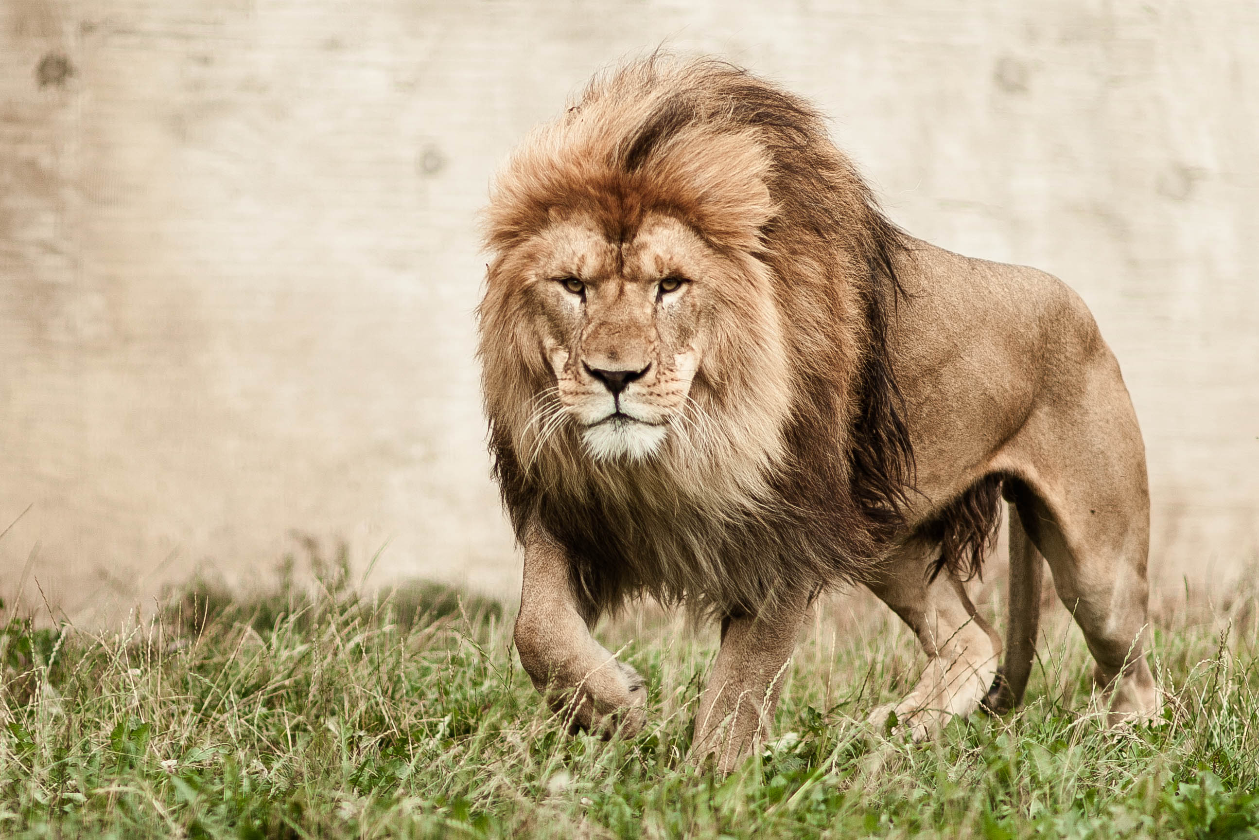 Löwe Liam